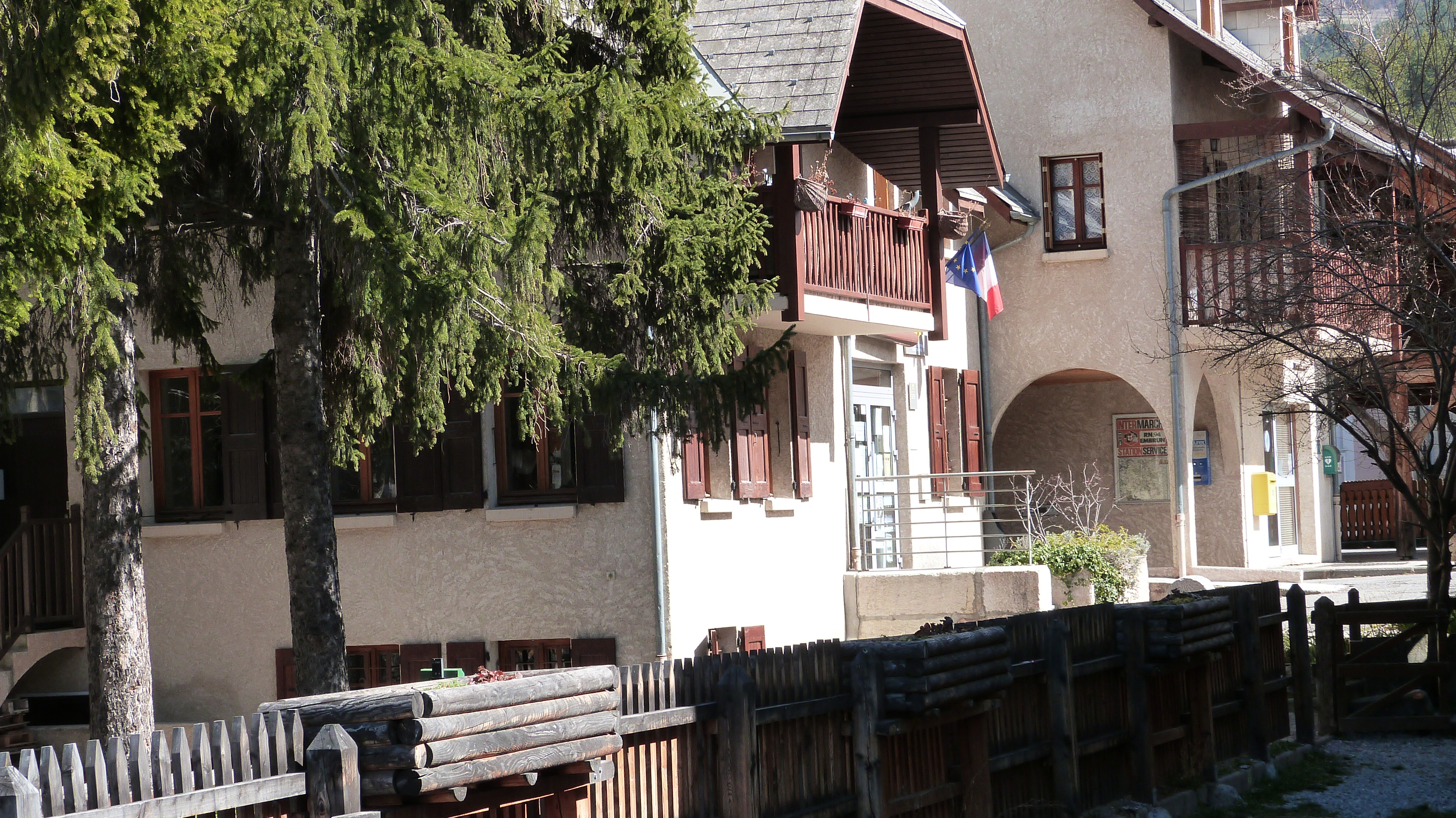 Place du Village